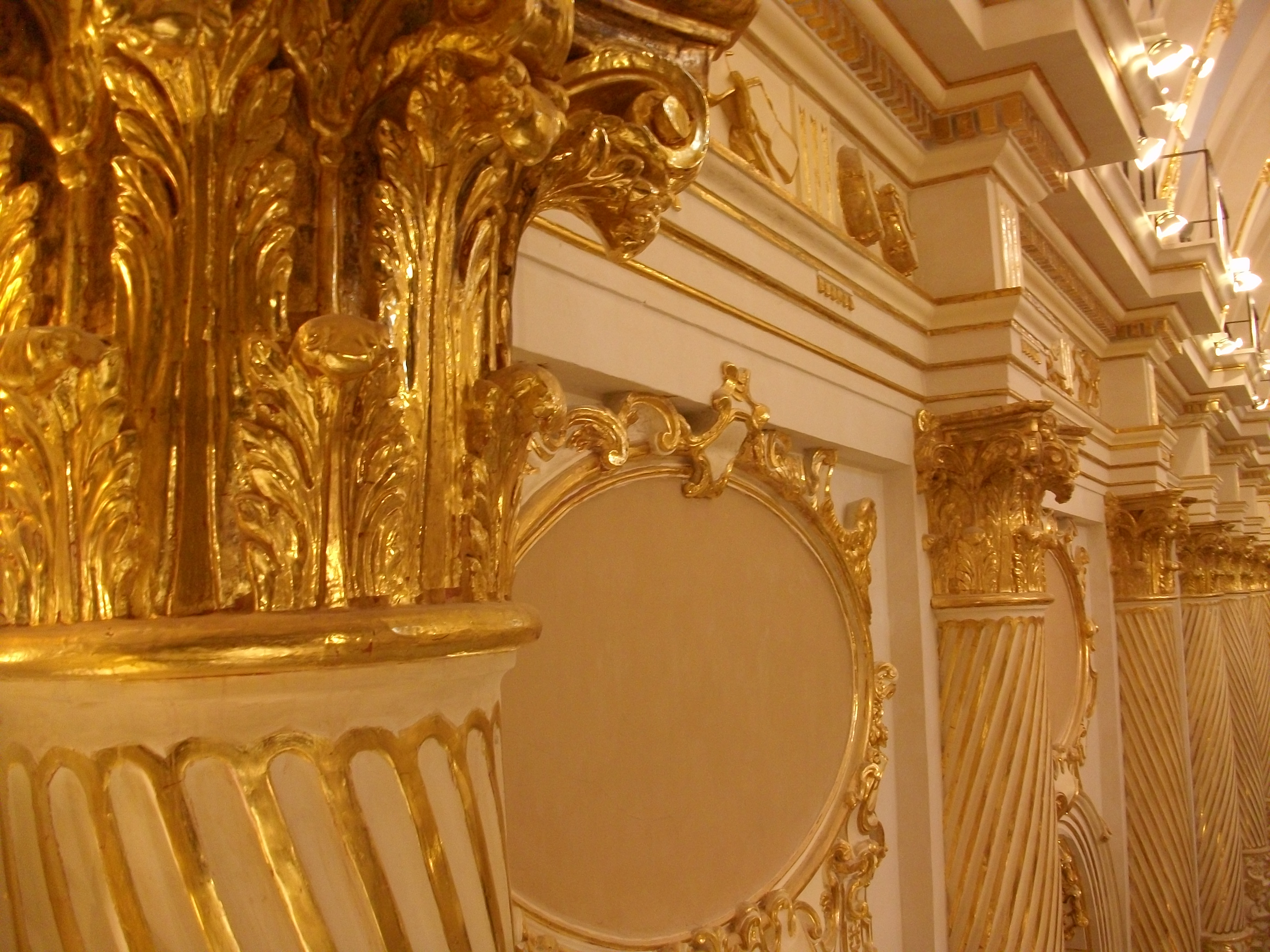 Vista de les semicolumnes que articulen la nau de l'església de Sant Martí de València, l'Horta, País Valencià.